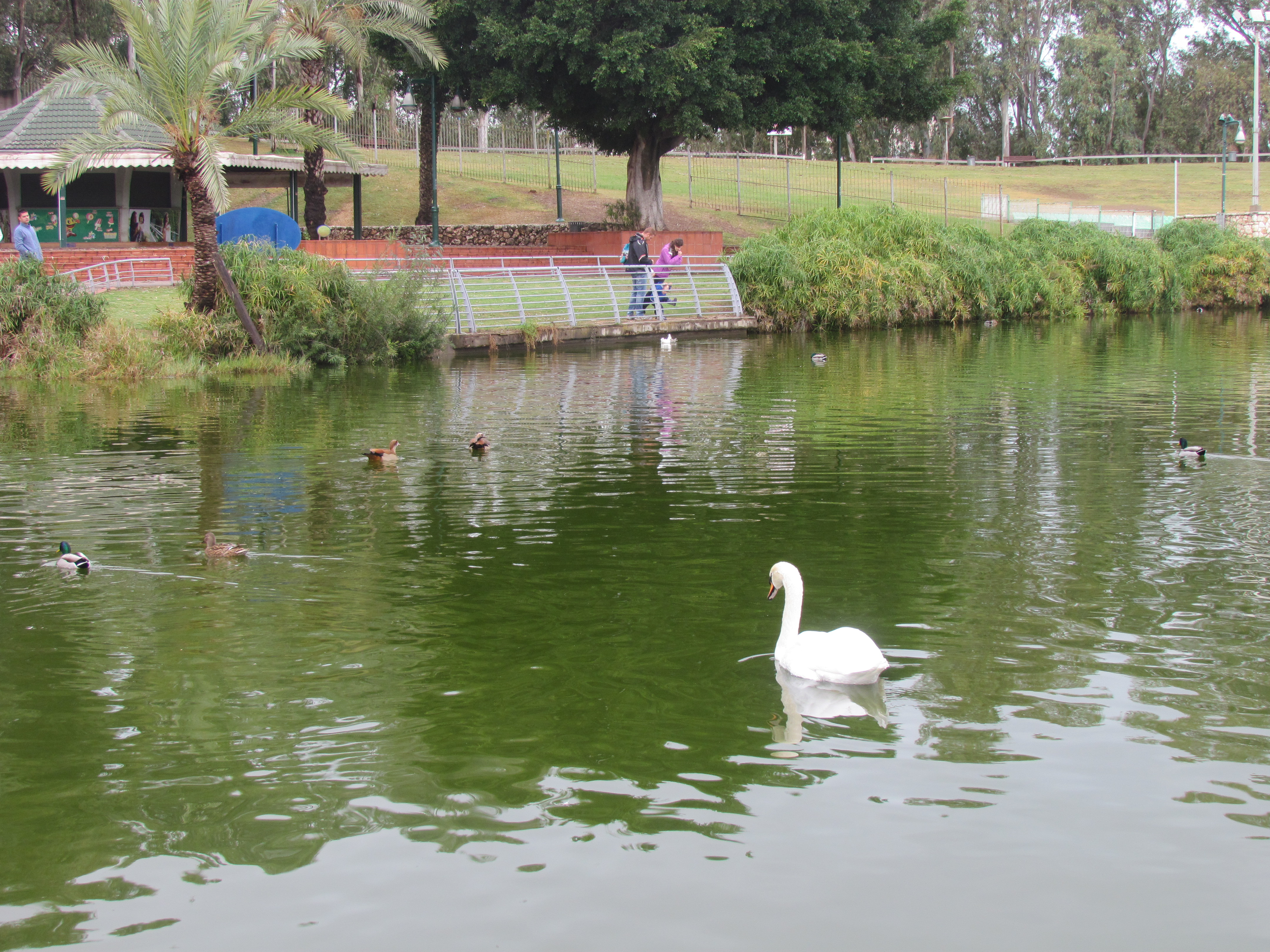 ברבור וברכיות בפארק הלאומי ברמת גן